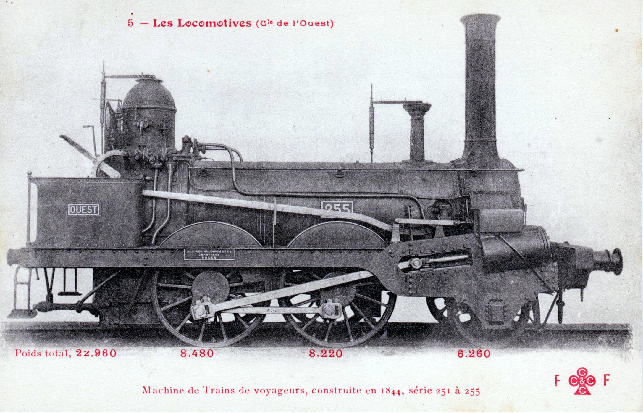 Locomotive construite par les ateliers Allcard Buddicom aux Chartreux à Rouen en 1844 et incorporée dans le parc de la Cie de l’Ouest sous le n° 255. surface de grille 1,02 m² timbre 8,500 k surface foyer 5,10 m² surface tubes 68,84 m² diamètre roues motrices 1,39 m diamètre des cylindres 0,355 m course des pistons 0,508 m écartement des essieux extrêmes 3,242 m poids total 22.960 kil. poids adhérent 16.760 kil.